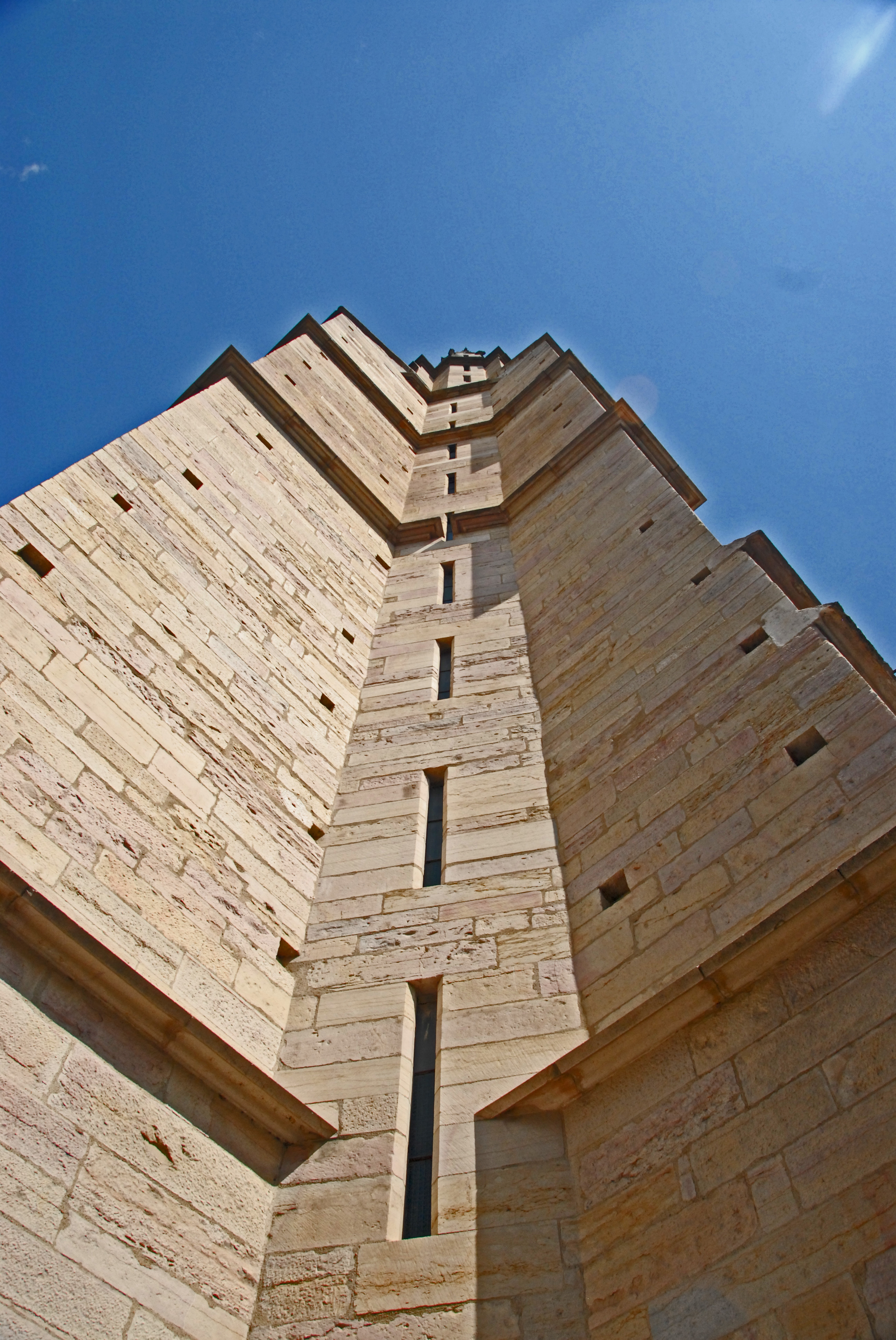 St-Bénigne, Westwerk südwestl. Kante